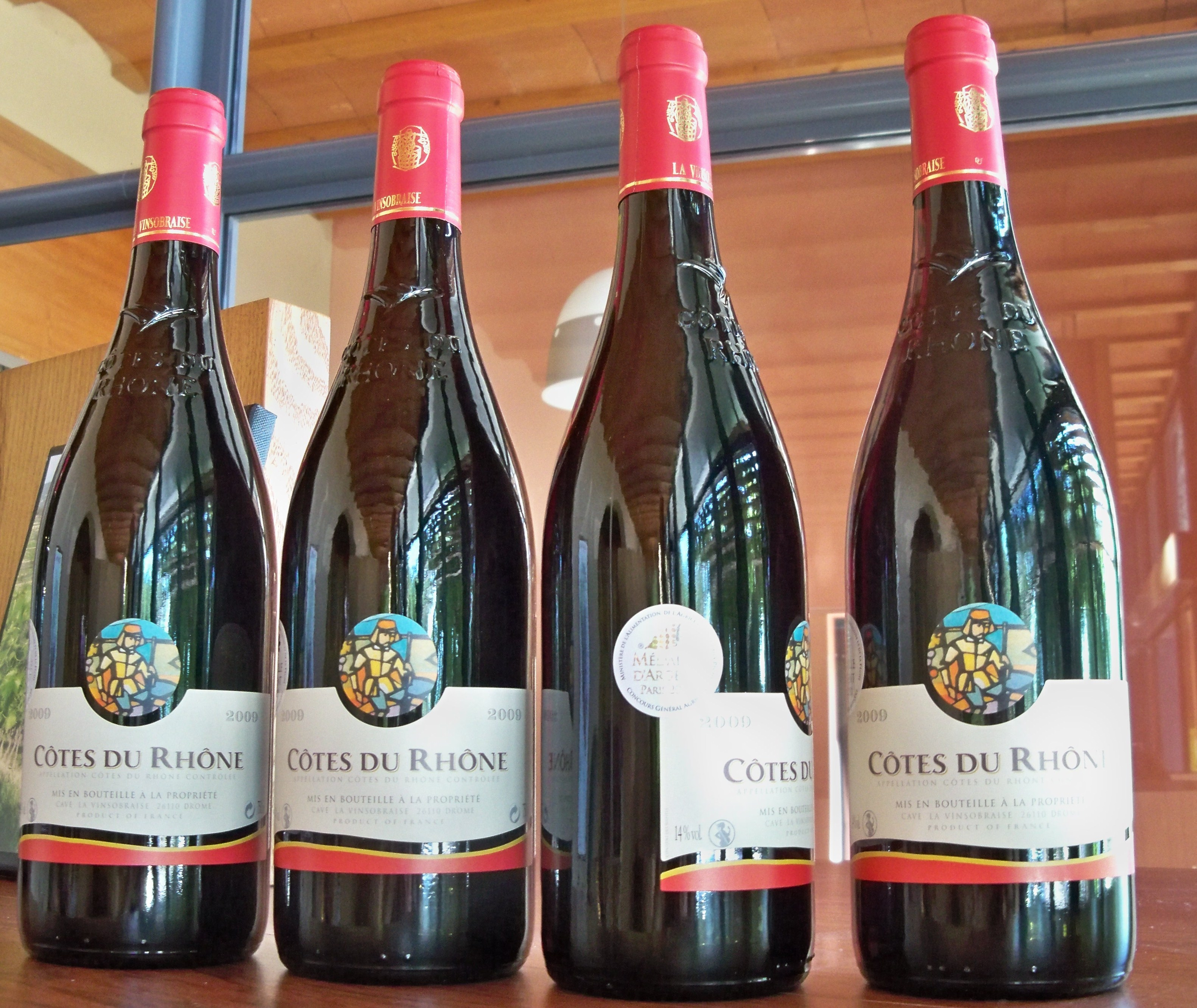 Bouteilles Côtes du Rhône de Vinsobres, Drôme, France